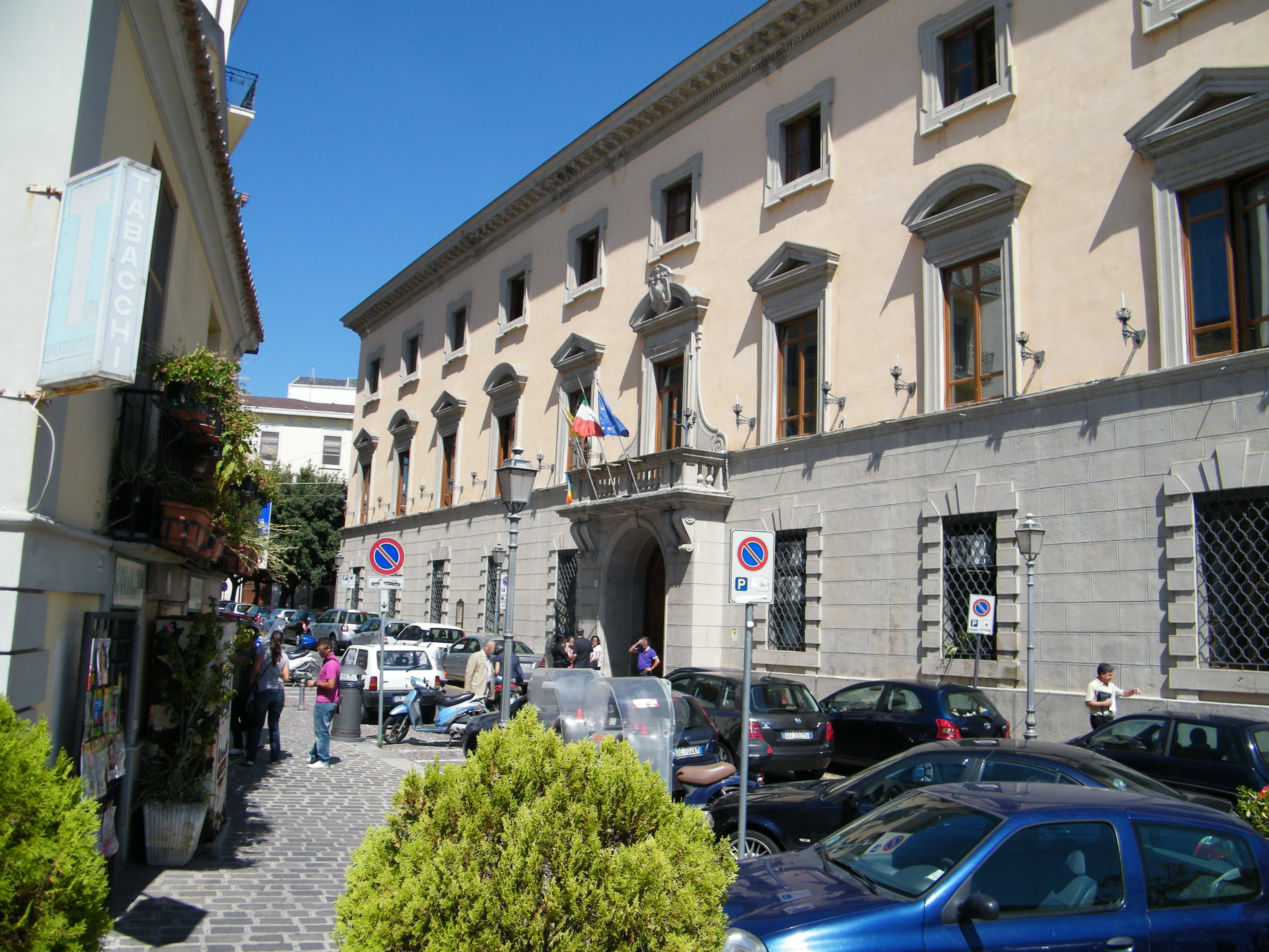 Palazza De Nobili, sede dell'amministrazione comunale. Vista da sinistra.